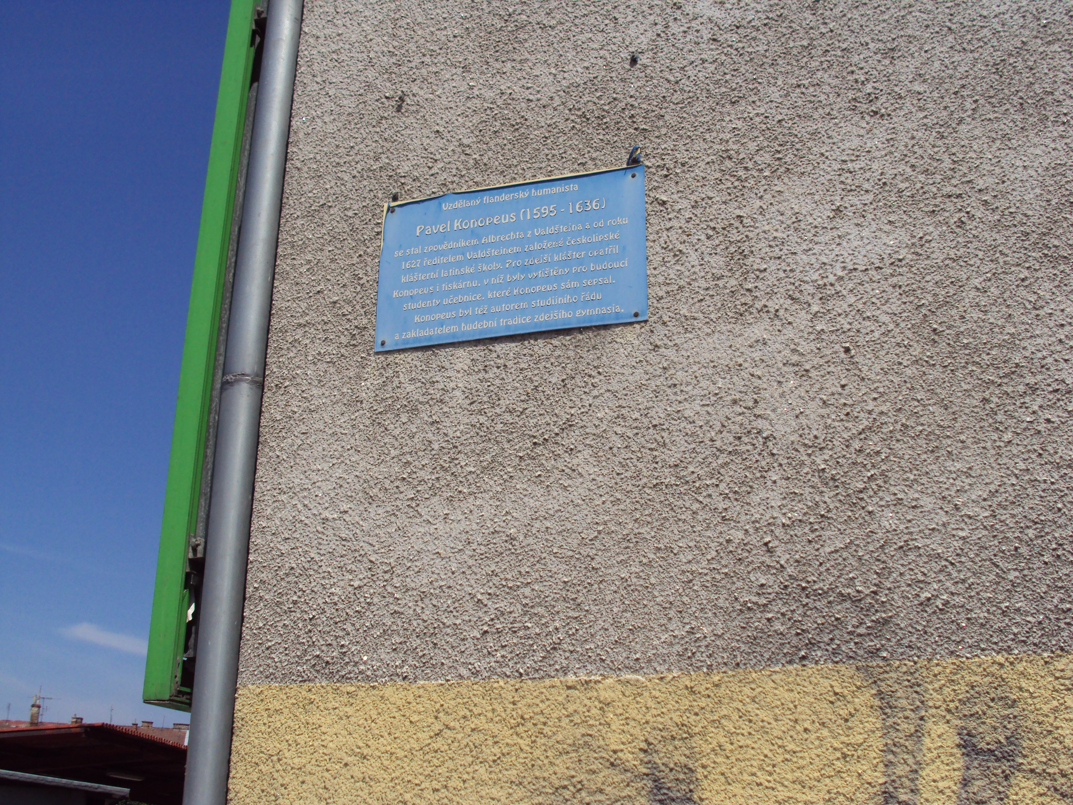 Česky: Pamětní deska Pavla Konopeuse z Nizozemí, ulice Konopeova v České Lípě